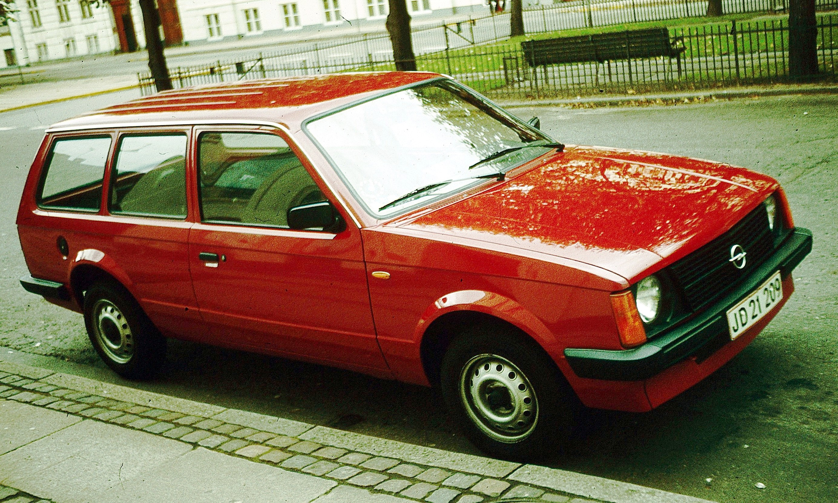 Opel Kadett D Kombi, dreitürig